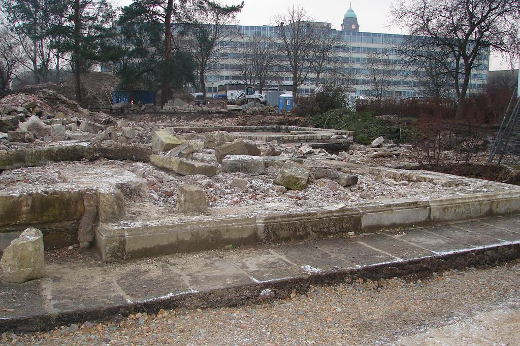 Grundmauern des ehemaligen Palais im Blüherpark zu Dresden